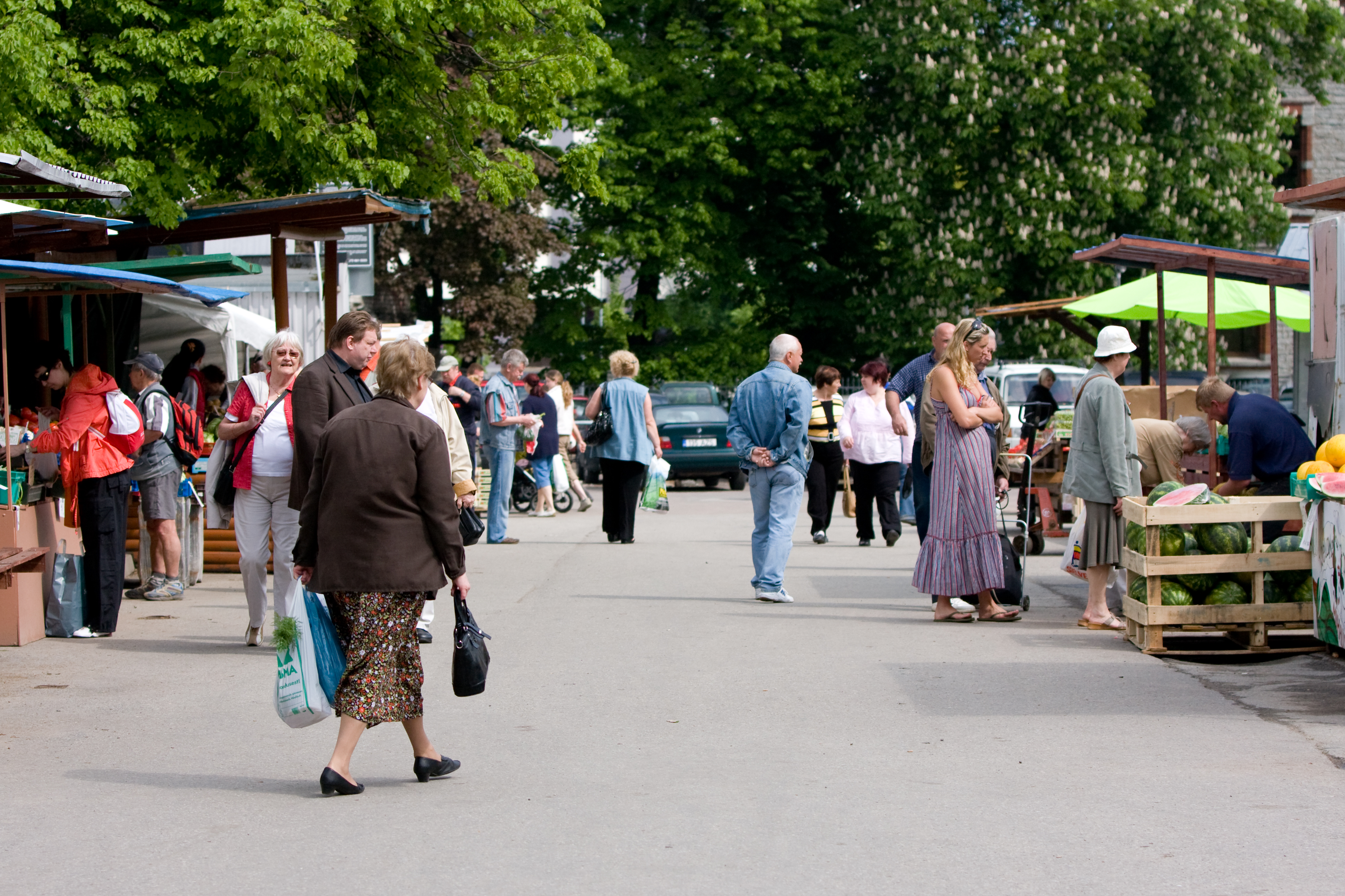 Tallinn central market in Keldrimäe, Tallinn, Estonia.